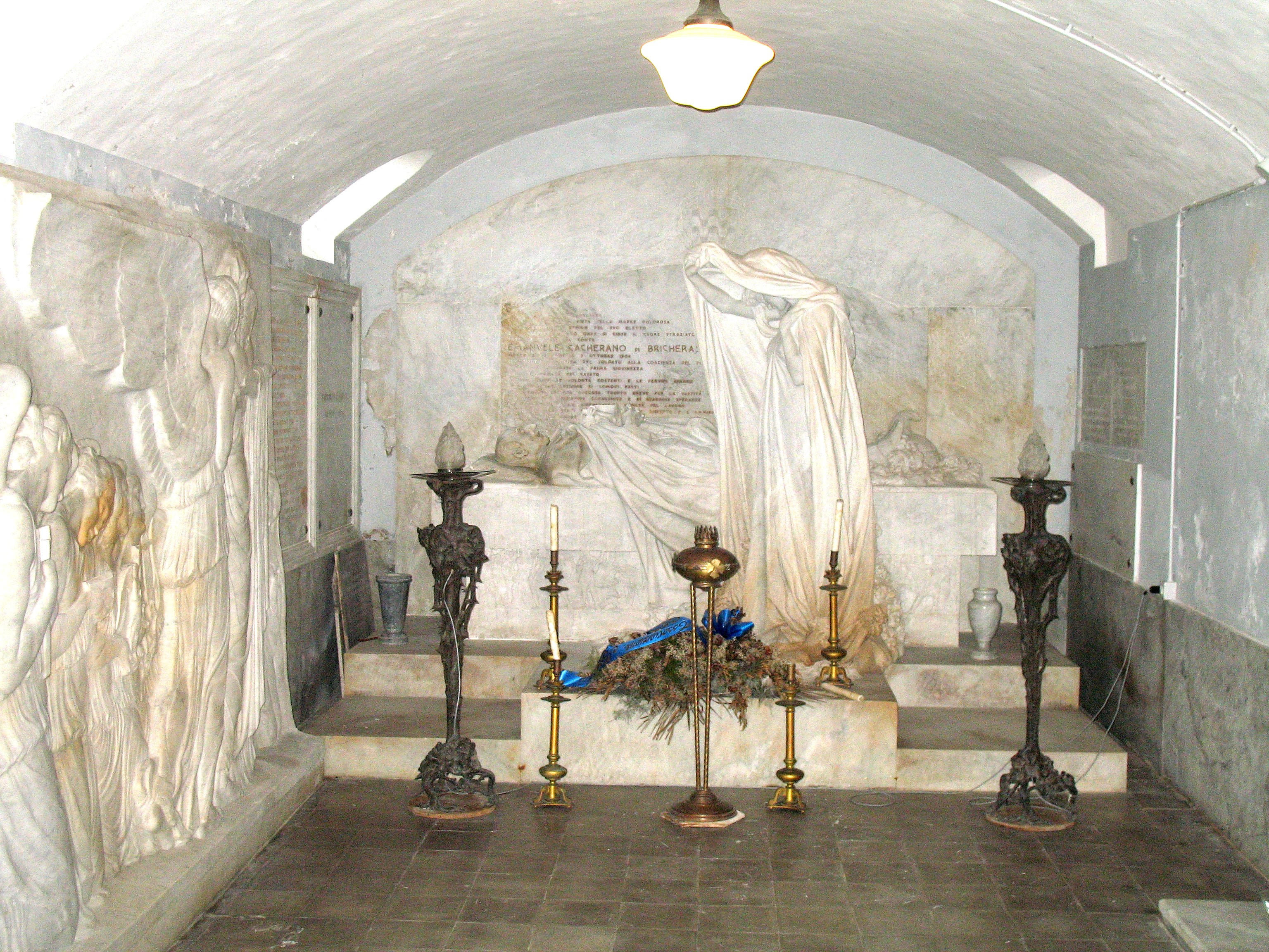 Monumento funerario per il conte Emanuele Cacherano di Bricherasio. Opera dello scultore Leonardo Bistolfi (1859-1933) - Cripta della Cappella Bricherasio a Fubine, Alessandria, Italia.